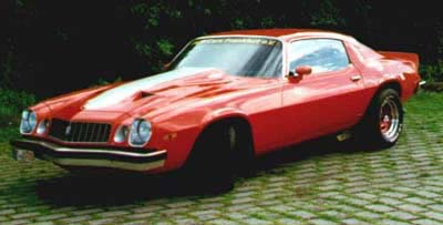 Chevrolet Camaro 1977-1981